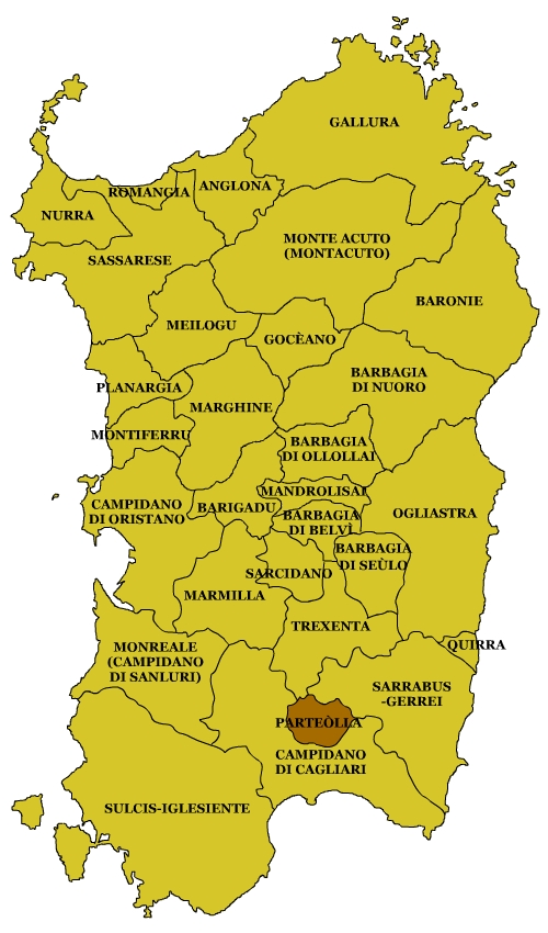 Sardinian Subregions